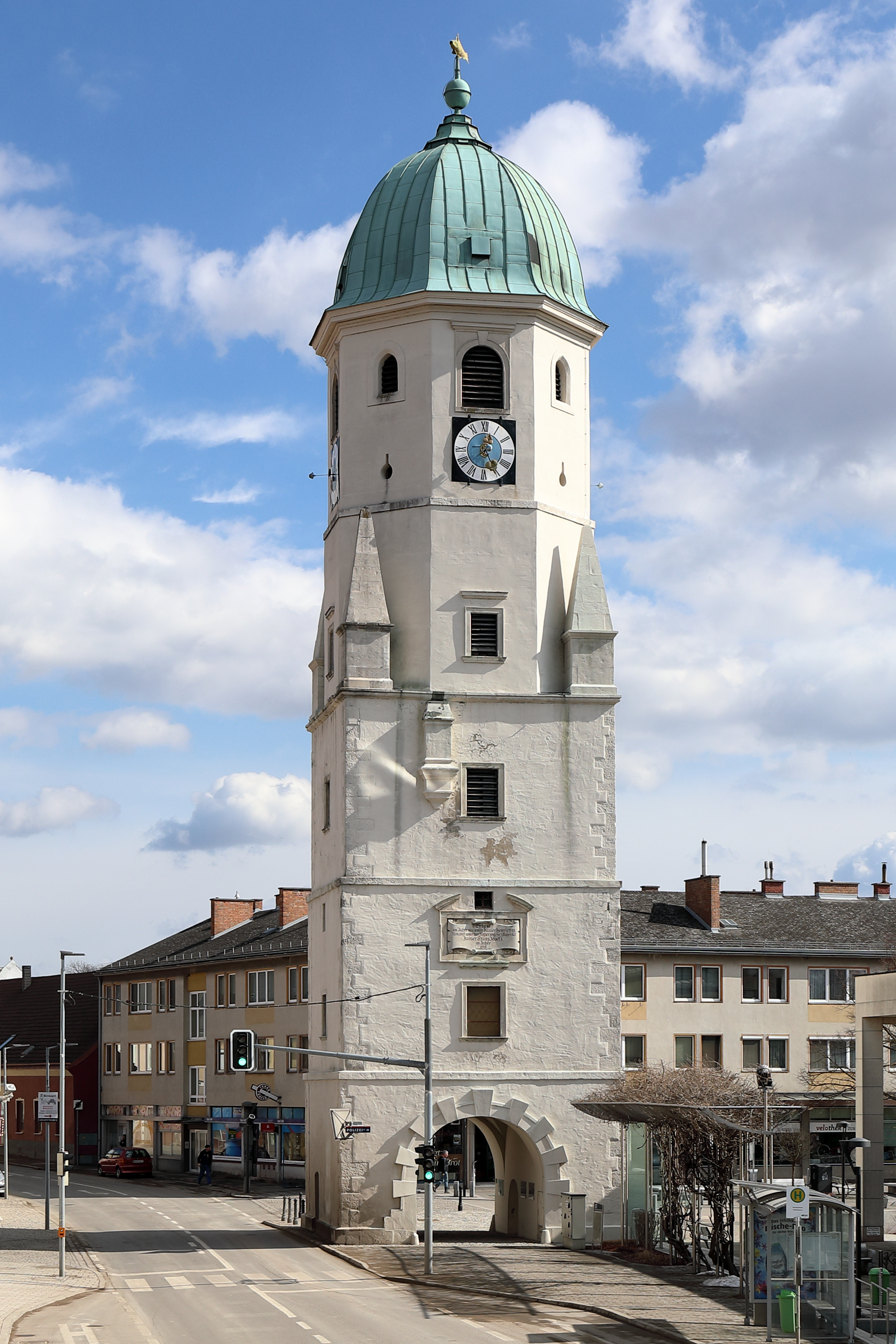 Westansicht des Stadtturmes, auch als Markt- und Fischaturm bezeichnet, in der niederösterreichischen Stadtgemeinde Fischamend.Das Wahrzeichen der Stadt wurde ursprünglich um 1050 als Grenz- und Wachturm errichtet. Im 17. Jahrhundert wurde er um 2 achteckige Geschosse erhöht. Anlässlich der Straßenregulierung wurde 1728 die kreuzgratgewölbte Durchfahrt ausgebrochen und 1978 erfolgte die Verlegung der Bundesstraße 9 (Hainburger Straße/ Wiener Straße), so dass der Marktturm seitdem umfahren wird. Nach einem Brand 1834 wurde das Wahrzeichen renoviert und erhielt weitgehend sein heutiges Erscheinungsbild. Bis 1927 diente der Turm als Gemeindestube und Nachtwächterwohnung und wird seither als Heimatmuseum genutzt.